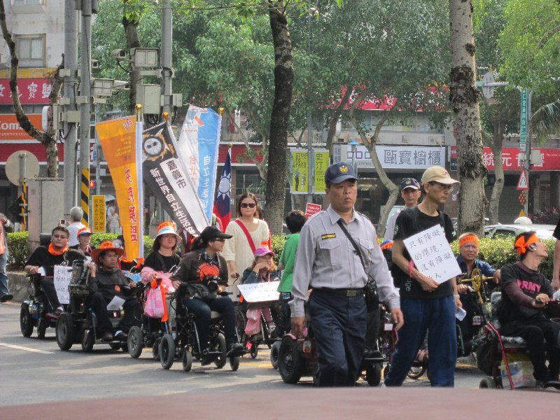 2012年10月14日自立生活大遊行（由臺北市市政大樓經臺北市忠孝東路至中華民國內政部），行經臺北市忠孝東路、仁愛路四段口。最左邊的立幟是中華民國殘障聯盟立幟。